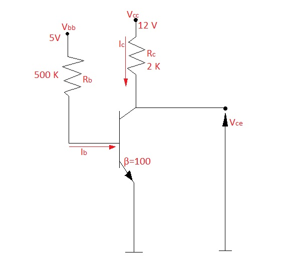 Transistor NPN de Q desconocida